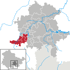 Verwaltungsgemeinschaft Bergbahnregion/Schwarzatal in Thuringia - District Saalfeld-Rudolstadt